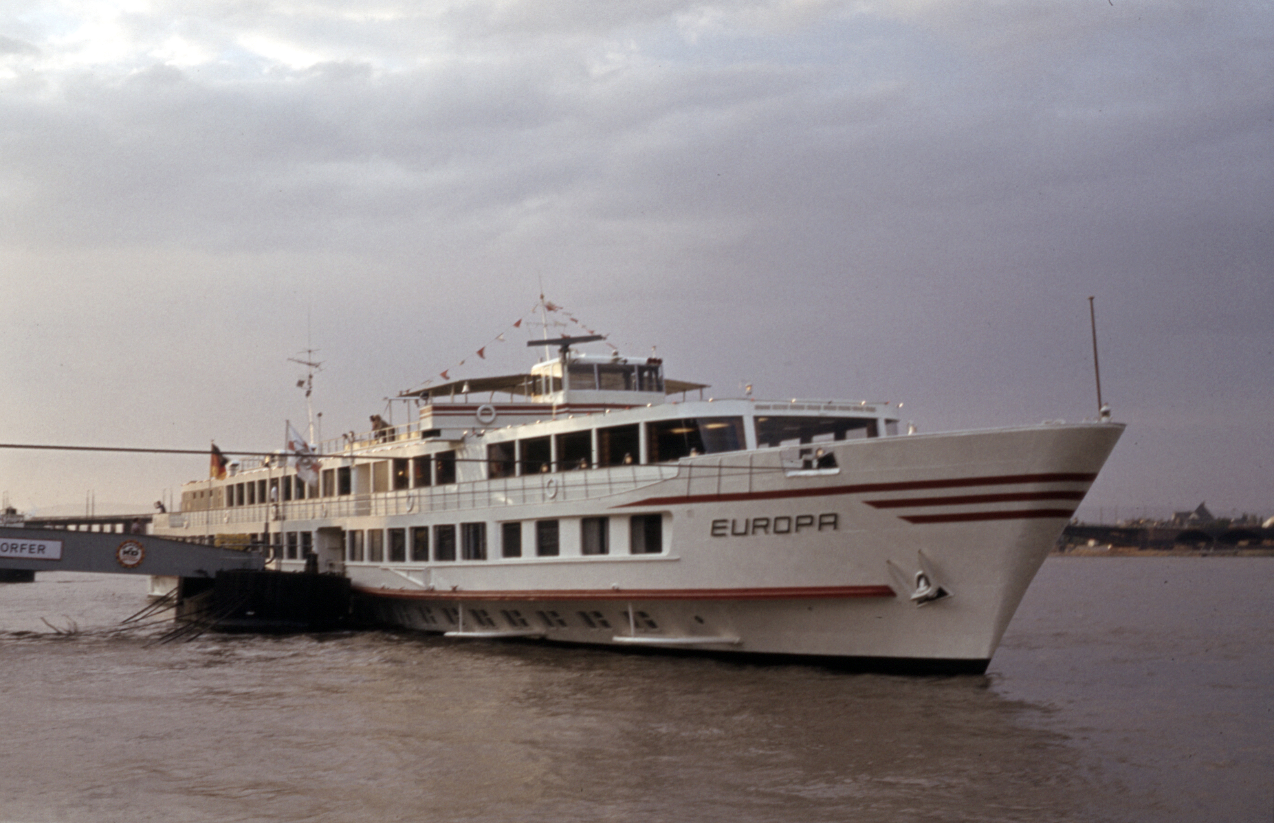 Das Kabinenfahrgastschiff Europa am Anleger.